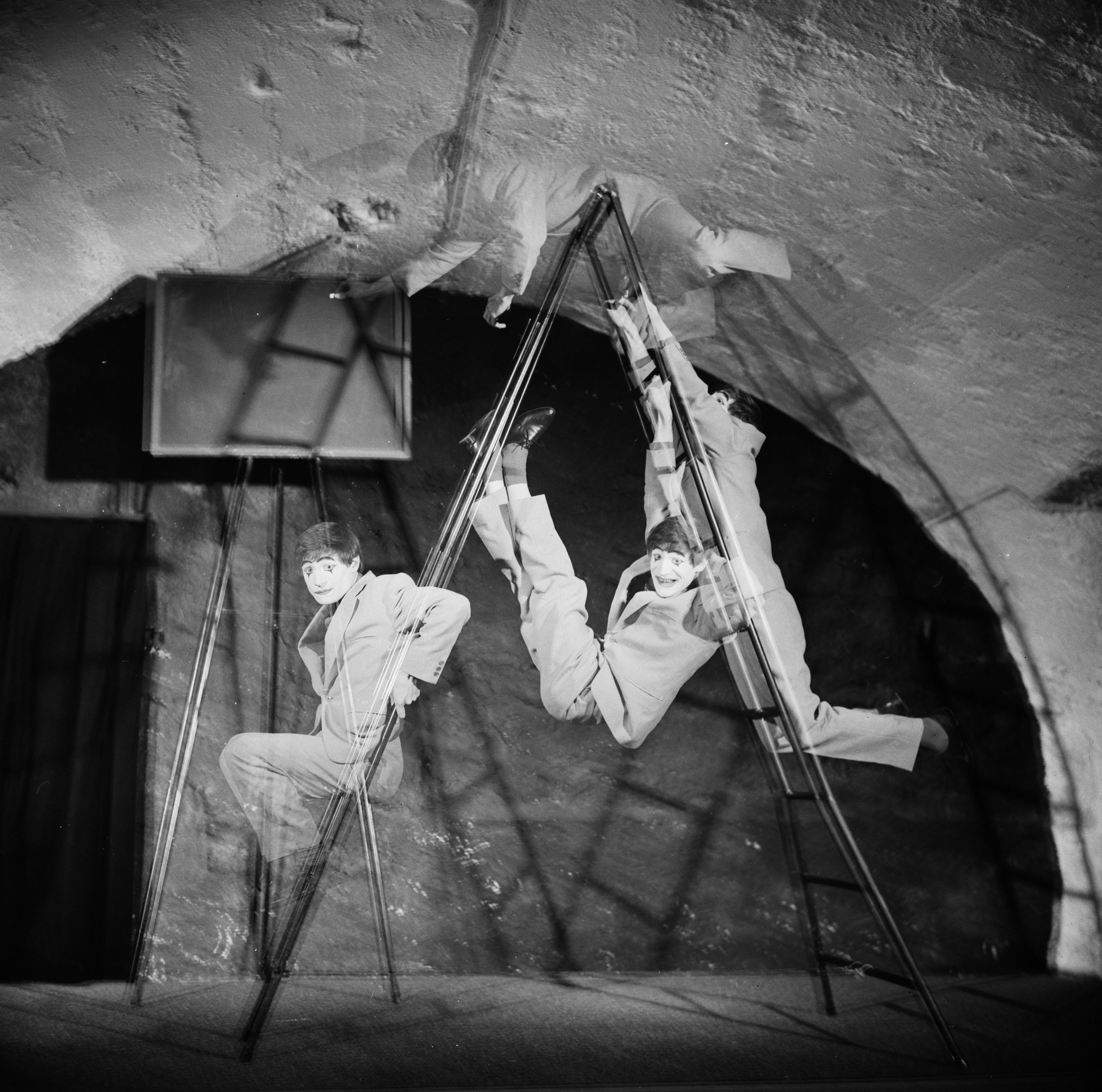 Dimitry Ascona, Schweiz, 1962. Reportage mit 12 Bildern